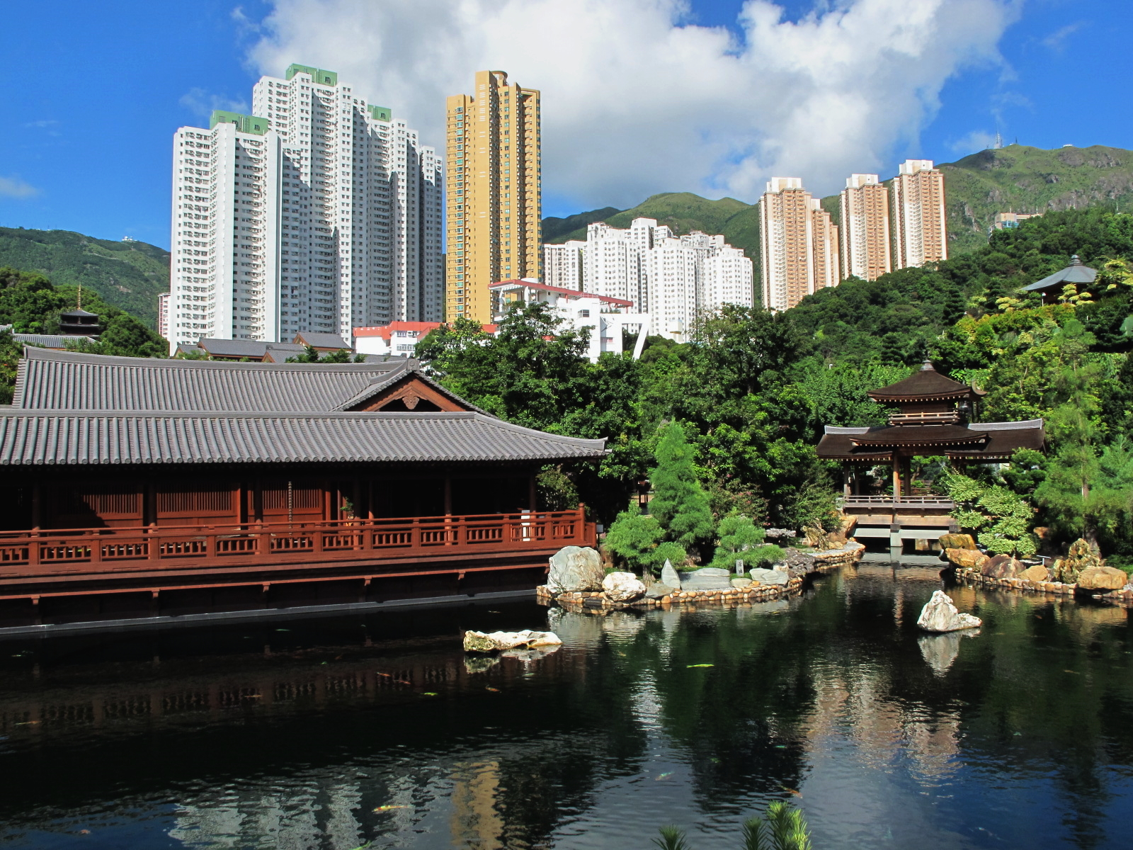 Nan Lian Garden 南蓮園池